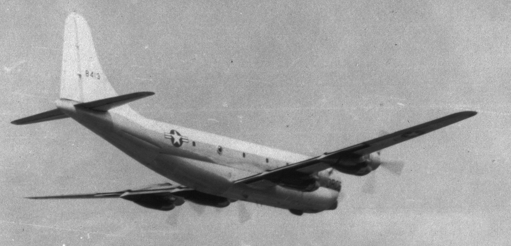 Boeing_C-97-Stratofreighter_Wiesbaden-1955, Ansicht von unten mit Ladeklappe u. a.